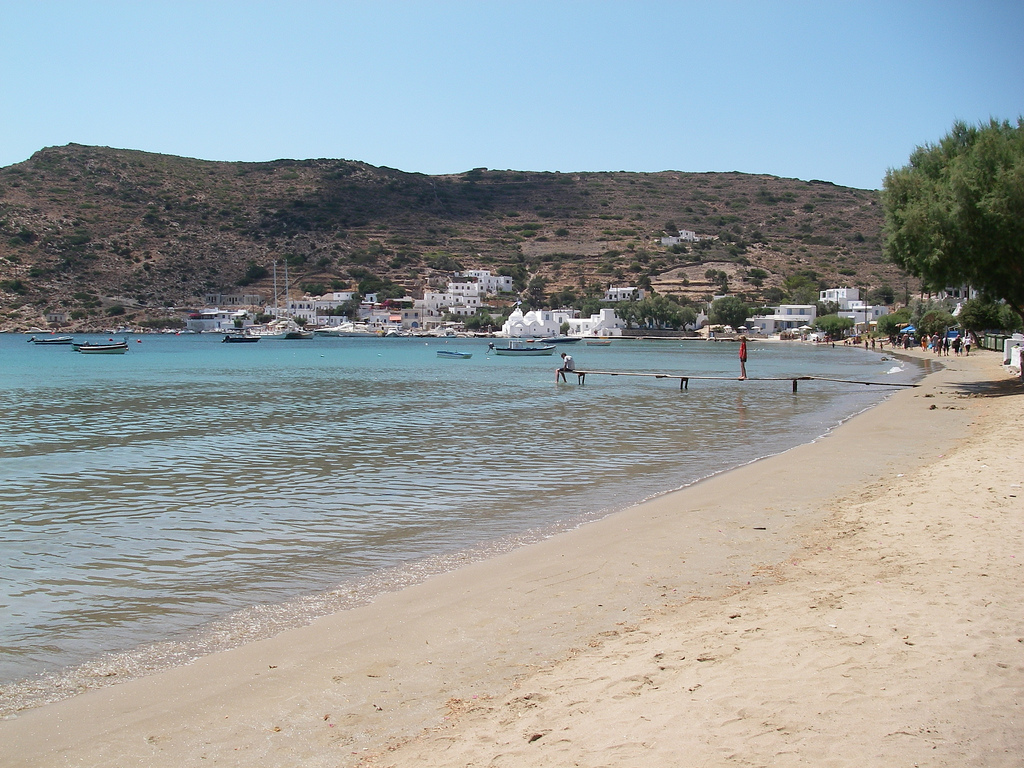 Plage de Vathi sur Sifnos